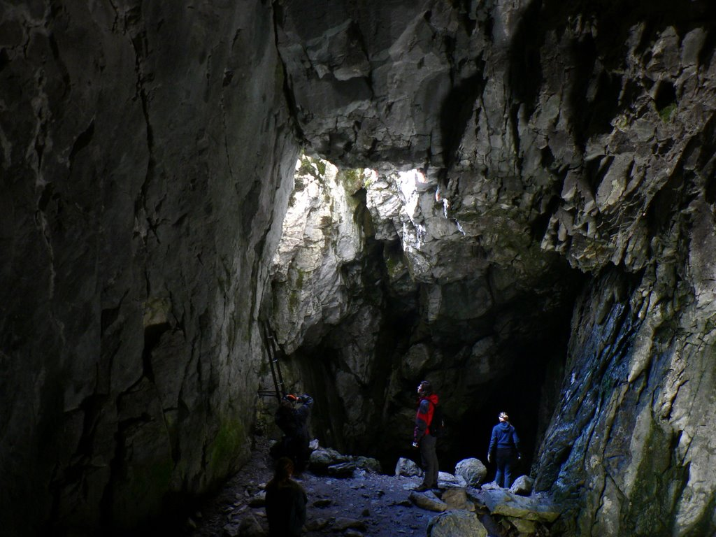 Wnętrze Jaskini Raptawickiej